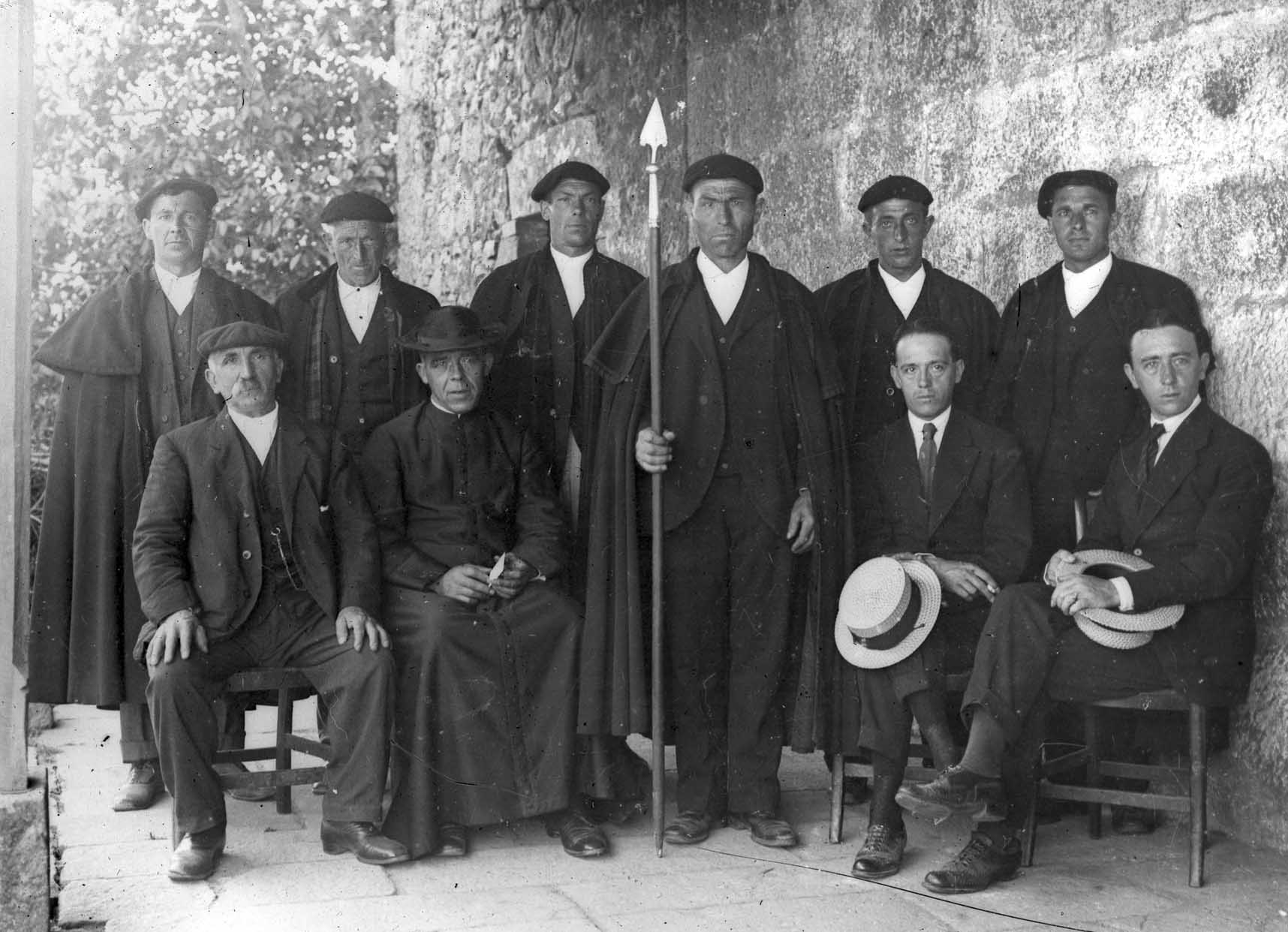 A la derecha, sentados y vestidos con traje, los hermanos Zubiaurre / El alcalde aparece con lanza, bastón de mando tradicional de Garai : 1 fotografía en blanco y negro, negativo en placa de vidrio